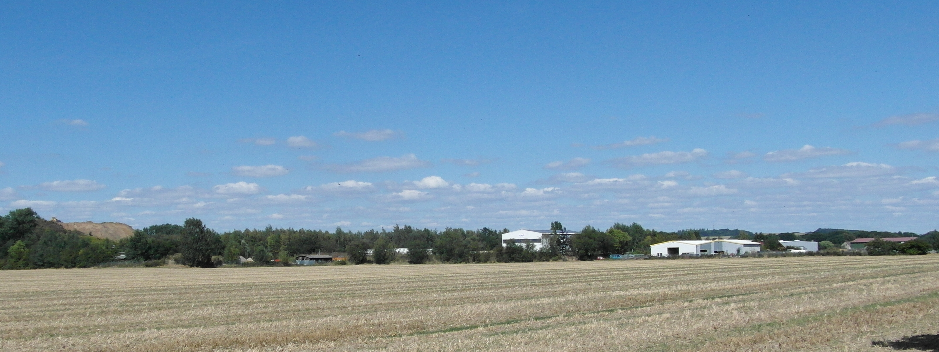 Die Eckerder Ortslage Schacht IV von Südsüdwesten